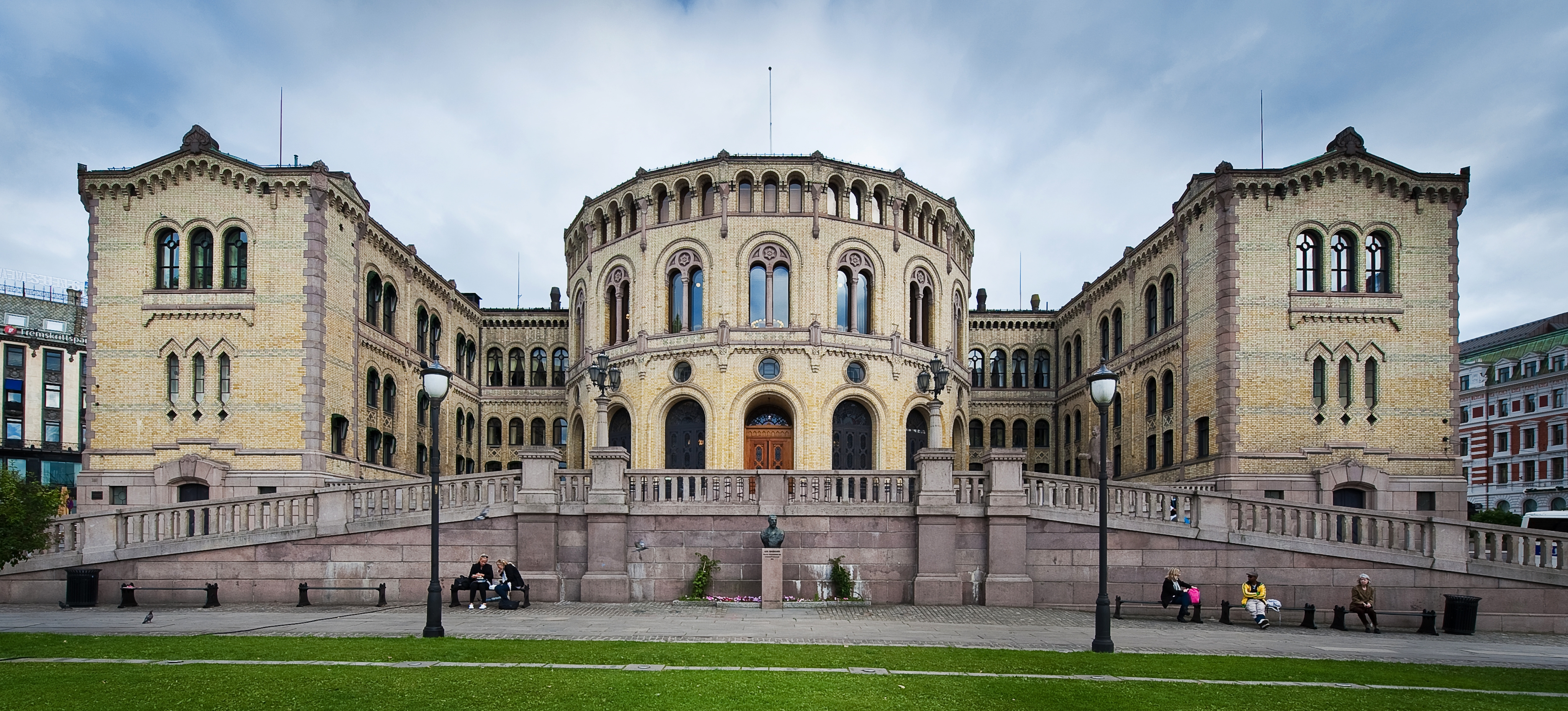 Stortinget, Oslo, Norway